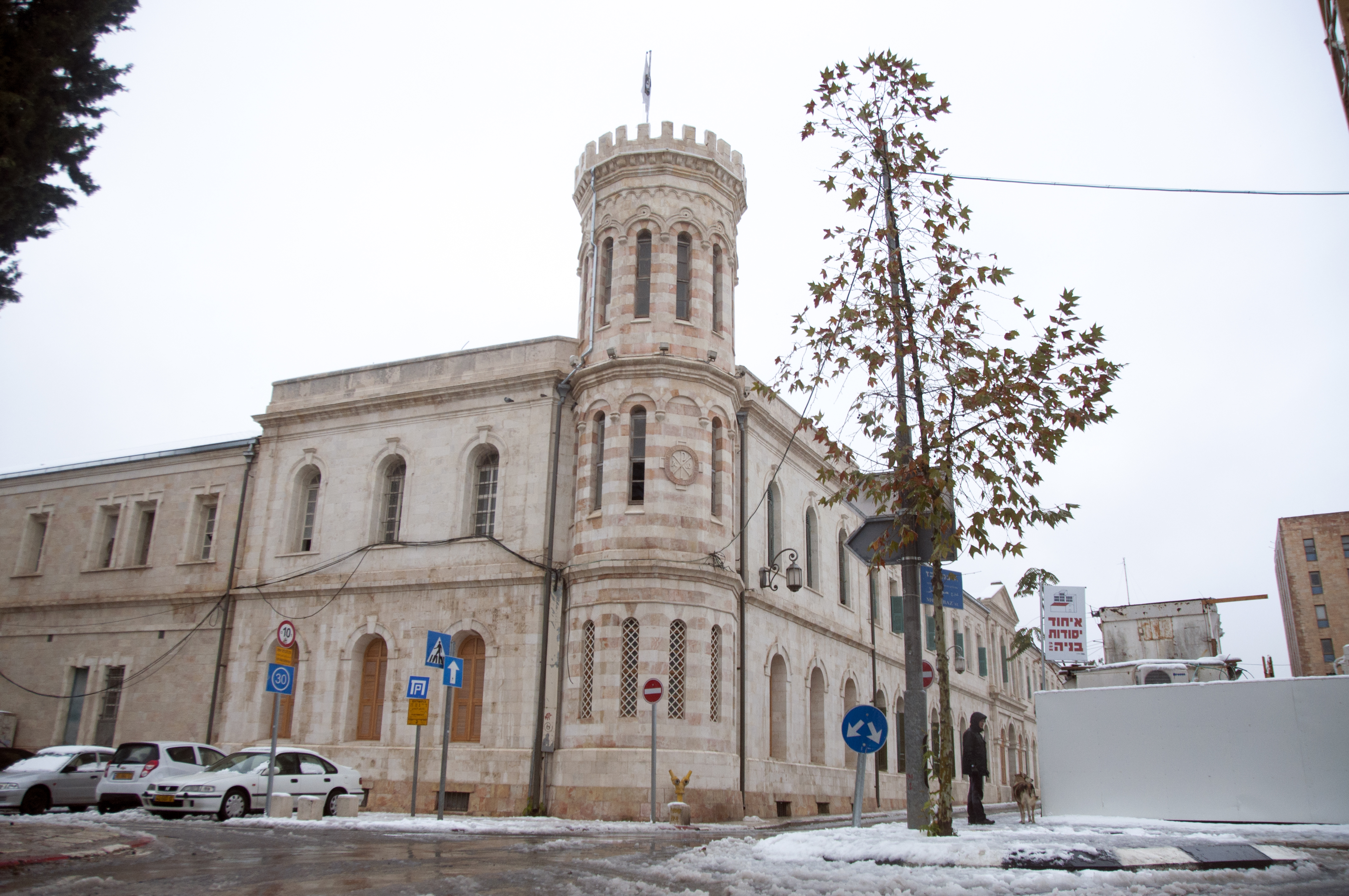 חצר סרגיי היא מבנה במתחם מגרש הרוסים בירושלים. נקראת על שם בנו של הצאר אלכסנדר השני, הנסיך סרגיי אלכסנדרוביץ. שוכנת ברחוב הלני המלכה 13 פינת רחוב מונבז. שימשה כאכסניה לצליינים רוסים. בעשורים האחרונים שכן בה משרד החקלאות. בנויה בסגנון הרנסאנס.